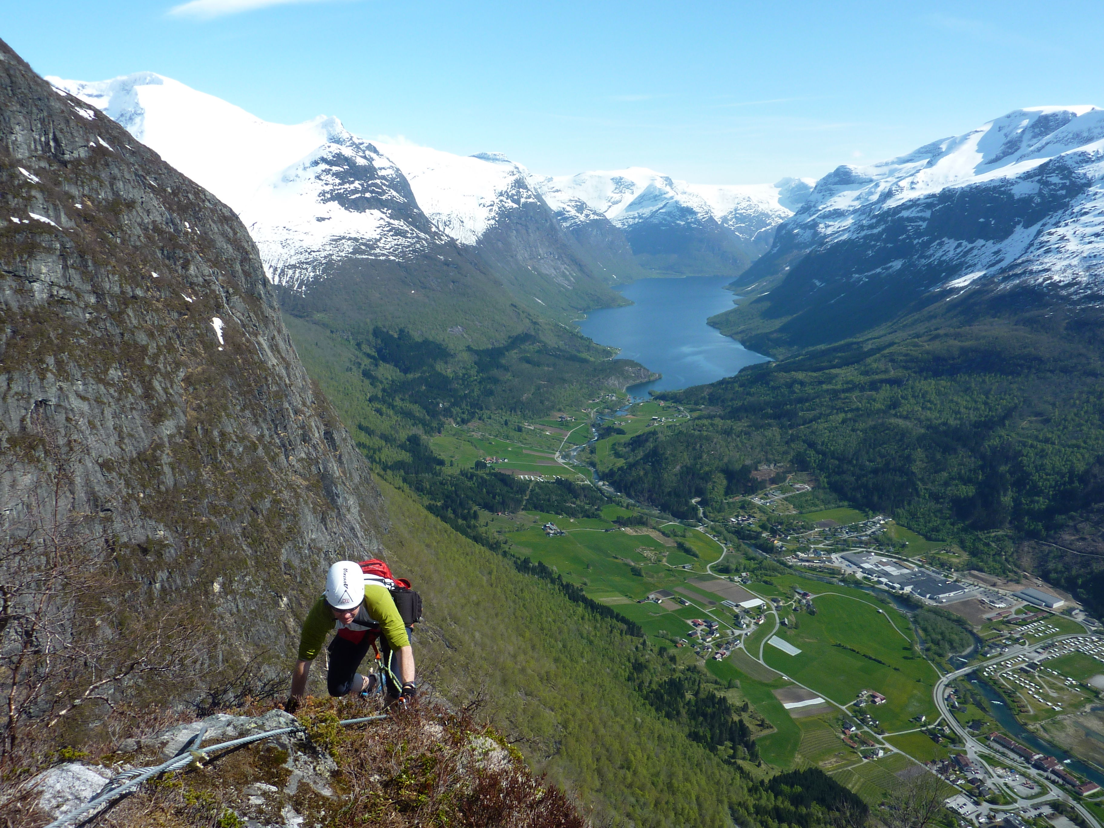 Via Ferrata Loen med utsikt mot Lodalen.